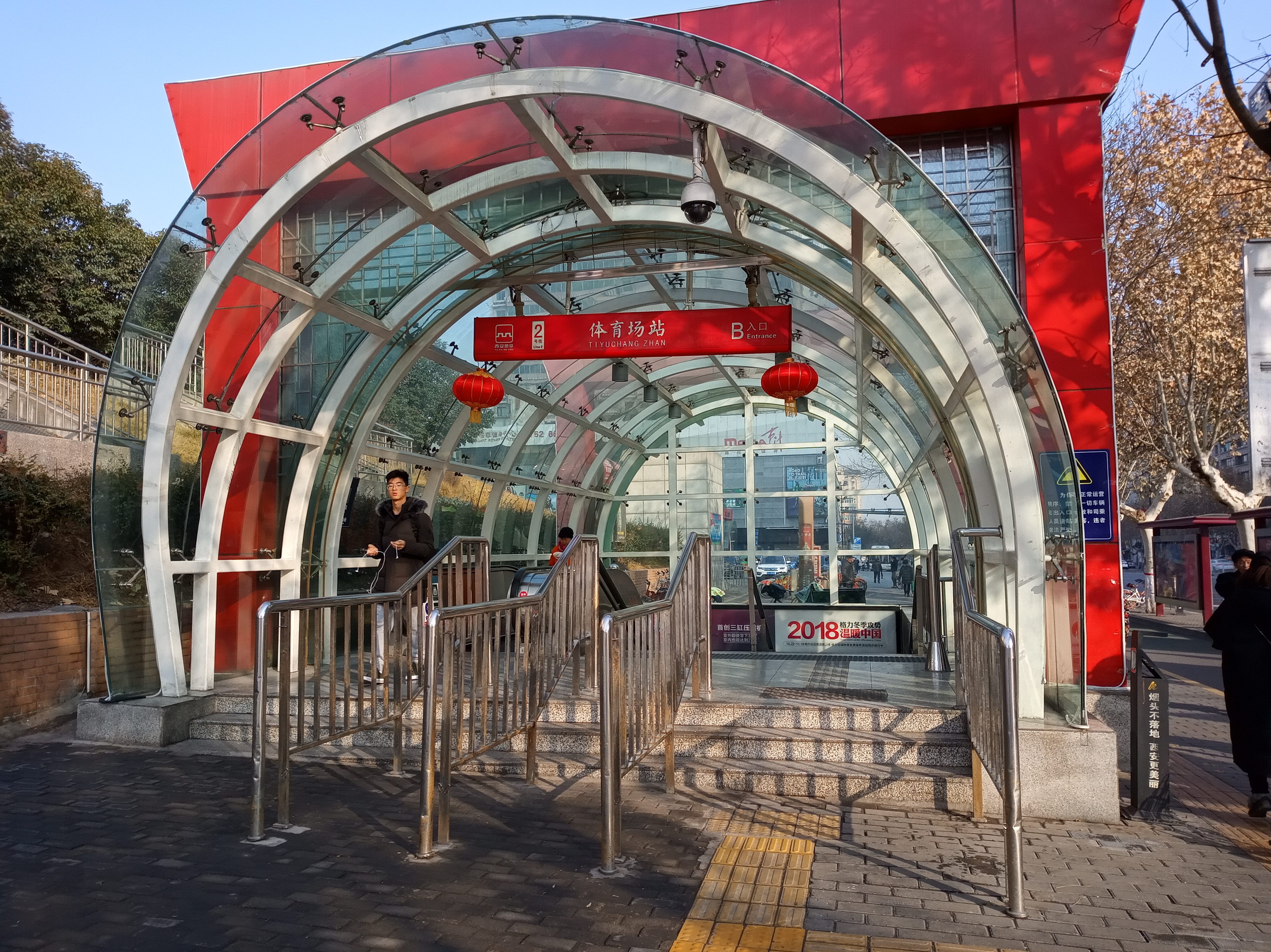 西安地铁2号线体育场站